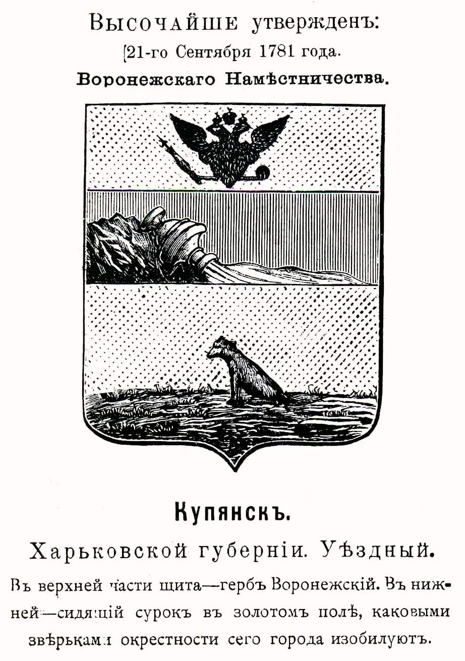 Official Russian Empire coat of arms Kupiansk. Герб Российской Империи уездного города Купянск в 1899 Харьковской губернии (в 1781 - Воронежского наместничества) с официальным описанием в Гербовнике Винклера.